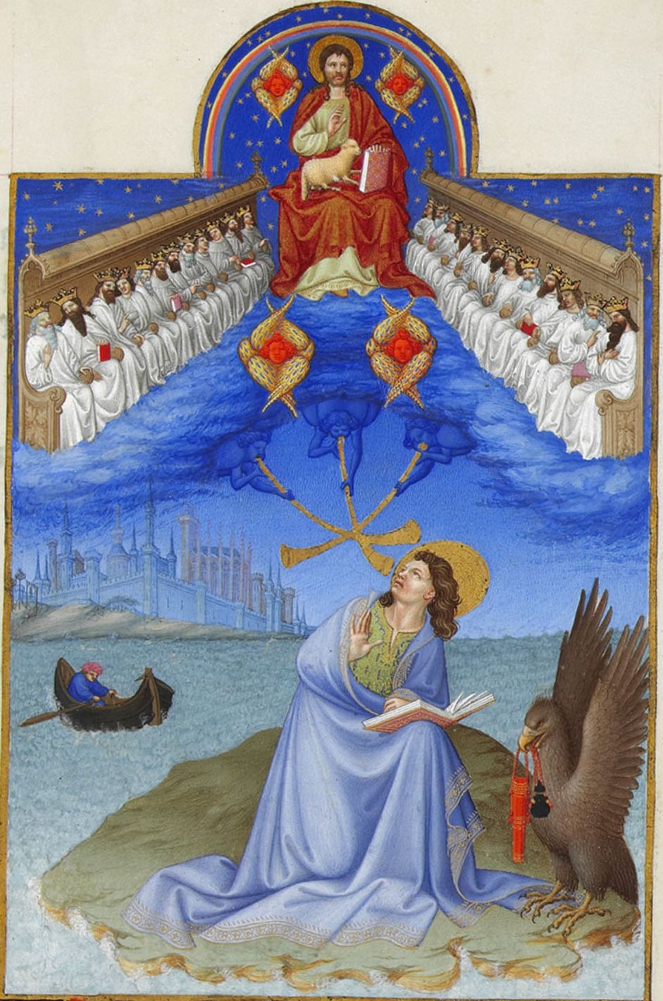 Saint Jean sur un îlot, un aigle à ses côtés, surmonté du Christ et des 24 vieillards, une ville en fond d'image